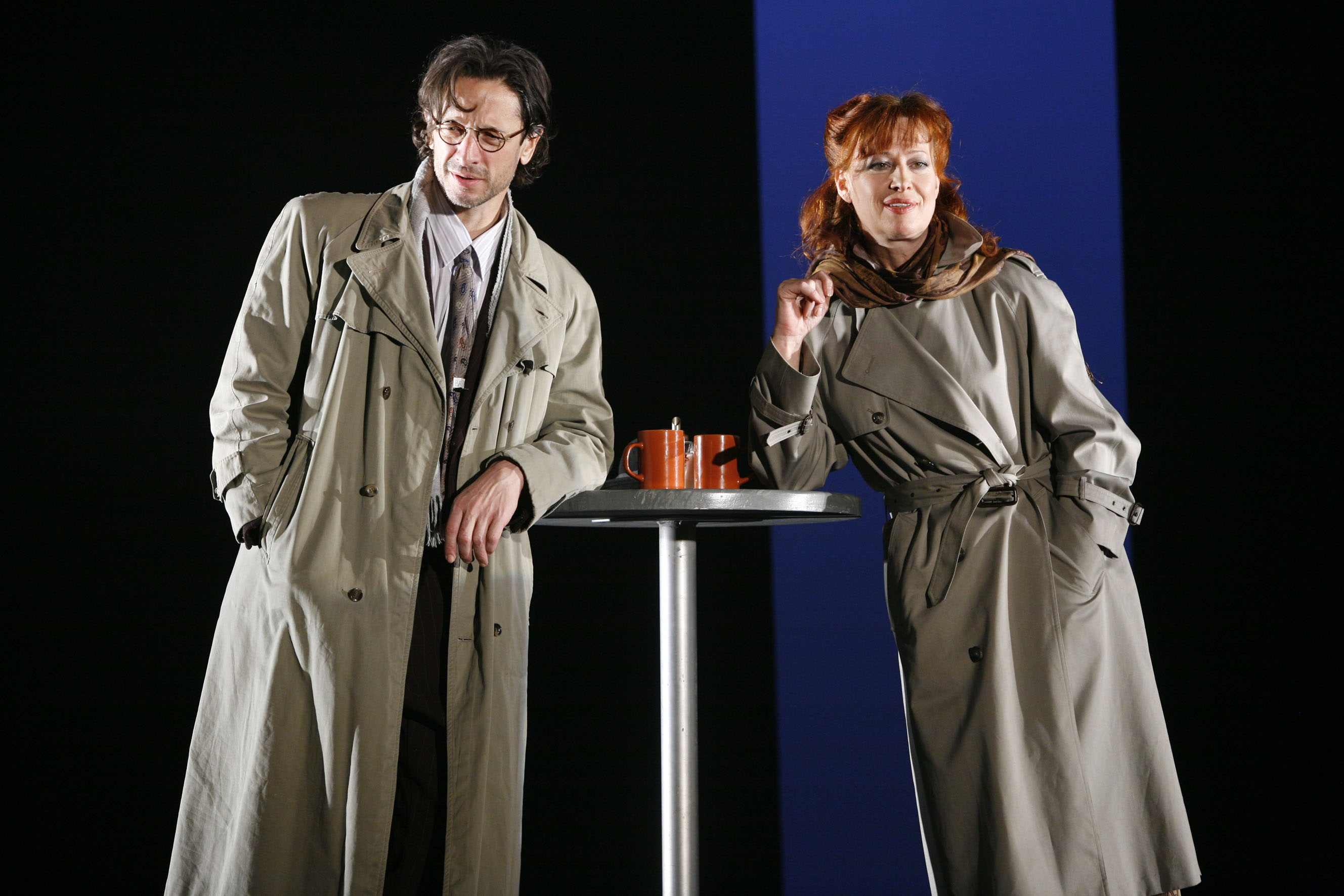 סשה דמידוב ורות חיילובסקי בהצגה שונאים סיפור אהבה, תיאטרון גשר